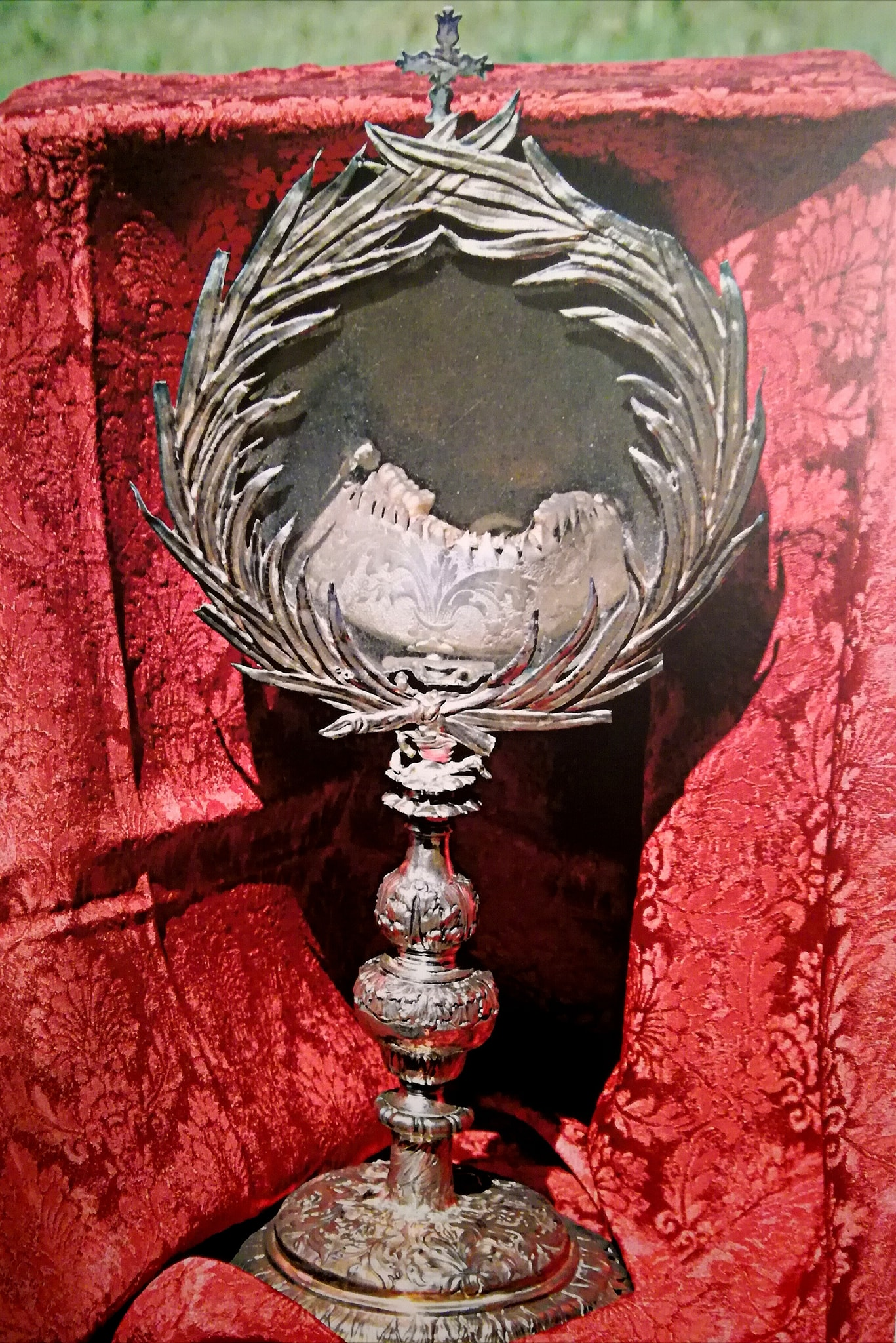 Reliquiario della mandibola di San Cesario diacono e martire, Basilica di San Cesario sul Panaro